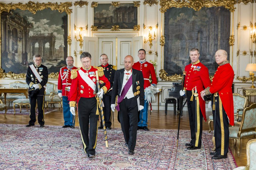 El Embajador del Perú en Suecia, José Beraún Aranibar, presentó ante la Reina Margarita II de Dinamarca Cartas Credenciales que lo acreditan como Embajador concurrente ante ese país. El nombramiento del Embajador concurrente ante Dinamarca, así como la reapertura de la Embajada del Perú en Suecia, se suscriben en el marco de una estrategia desarrollada por el Ministerio de Relaciones Exteriores del Perú para relanzar las relaciones con los países nórdicos. Continúa leyendo la nota en nuestra Web: bit.ly/16H0a3r